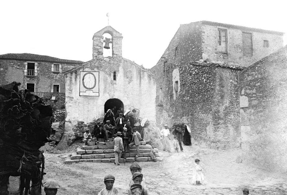 Imatge